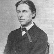 Nuori luonnontieteilijä Johan August Malmberg (Aukusti Juhana Mela vuodesta 1876 lähtien) vuonna 1867. (finnish) Den unga Johan August Malmberg (A. J. Mela från 1876) år 1867. (swedish)